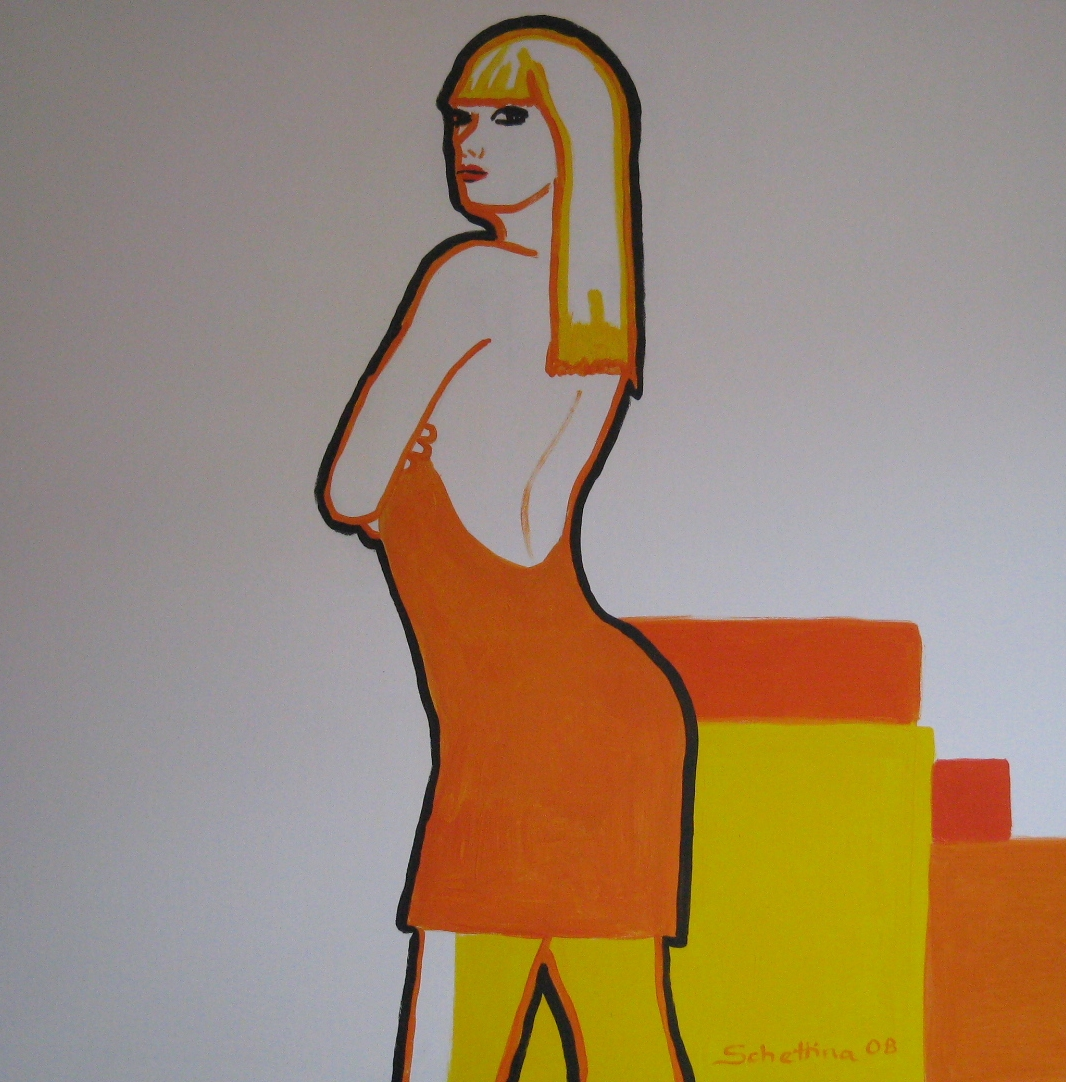 Bild Oranges Kleid von Martina Schettinatitle QS:P1476,de:"Bild Oranges Kleid von Martina Schettina" label QS:Lde,"Bild Oranges Kleid von Martina Schettina"